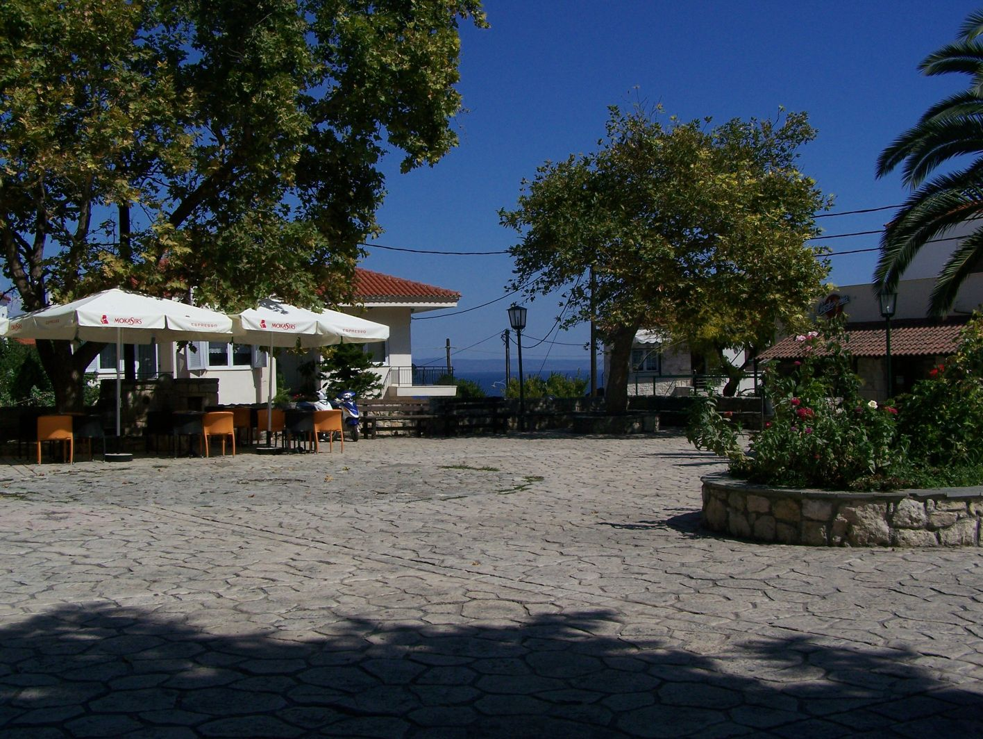 Markt in Afytos